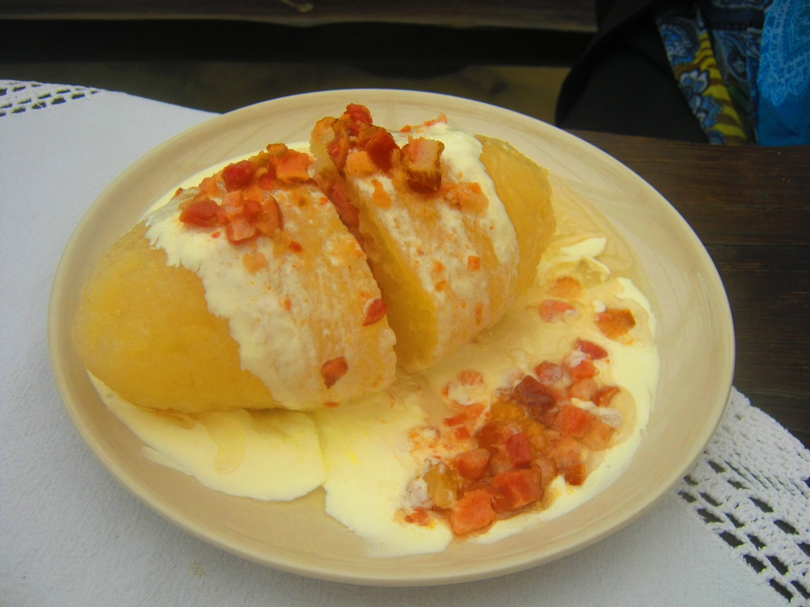 Cepelinas